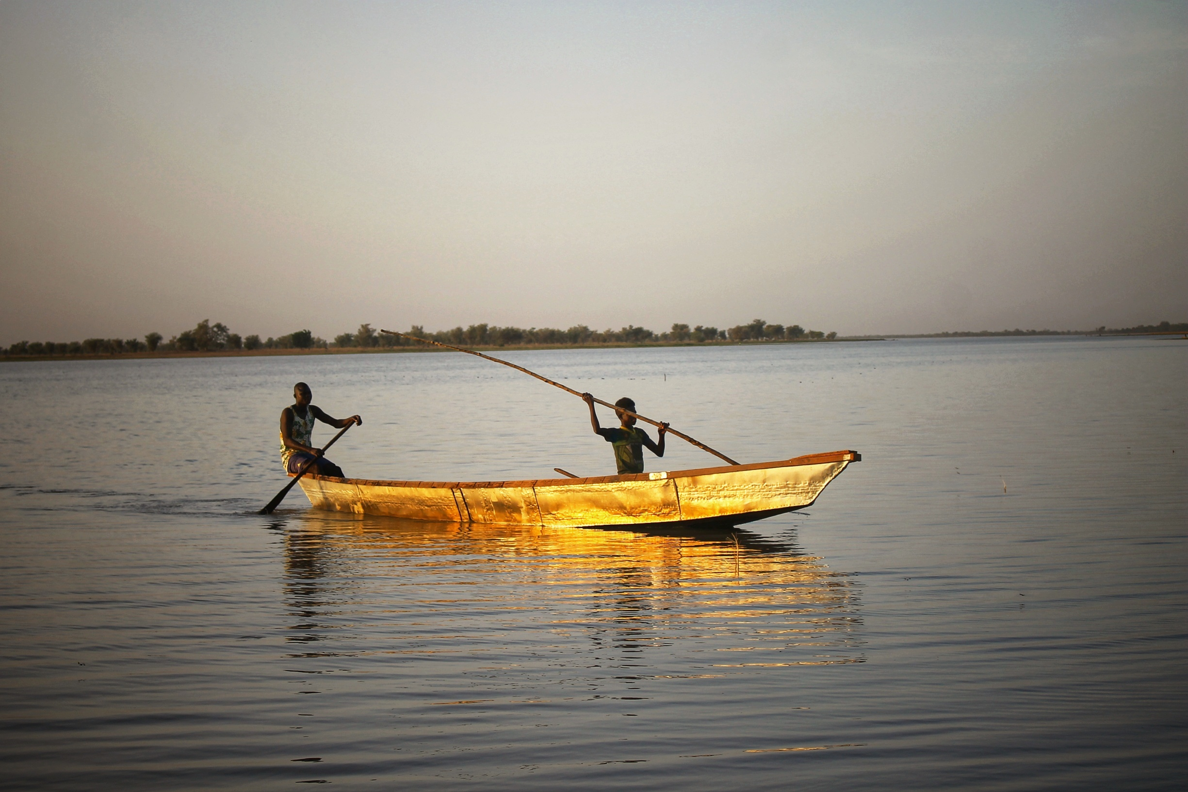 Les pêcheurs dans le lac de Guere situé dans le département du Mayo Danay à l'Extrême nord du Cameroun This is an image with the theme "Africa on the Move or Transport" from: Cameroon